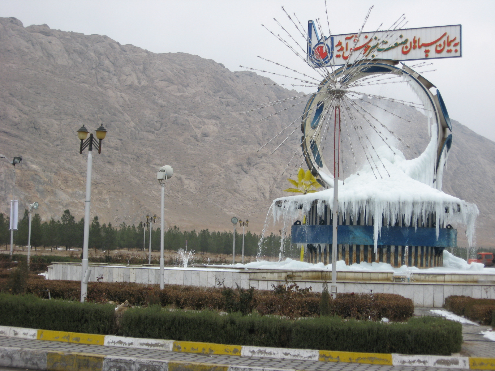 فلکه ورودی شهر از طرف اصفهان